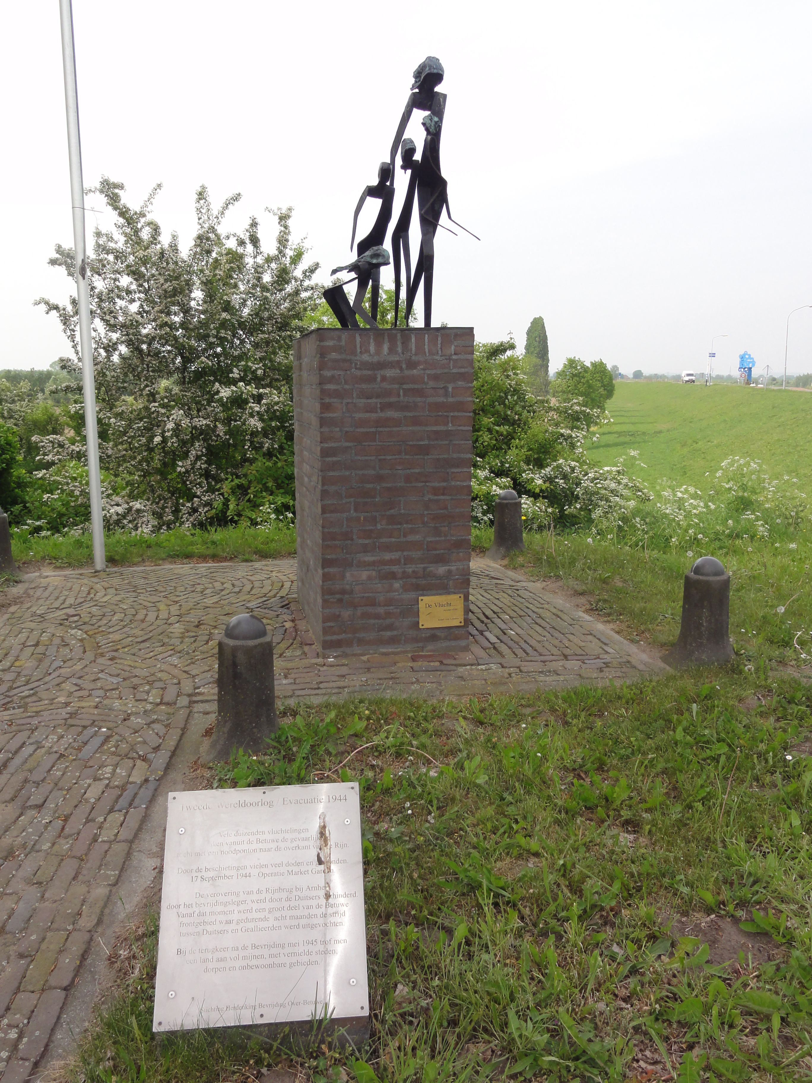 Doornenburg (Lingewaard) oorlogsmonument De Vlucht, overzicht